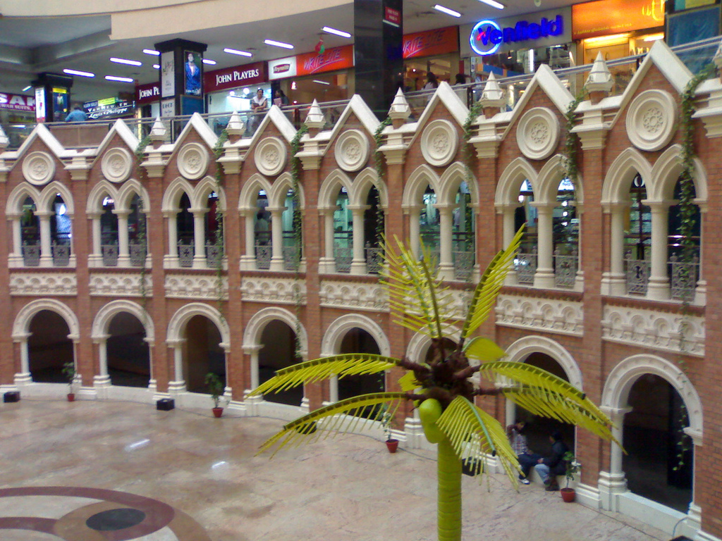 Spencer Plaza, Chennai, India.